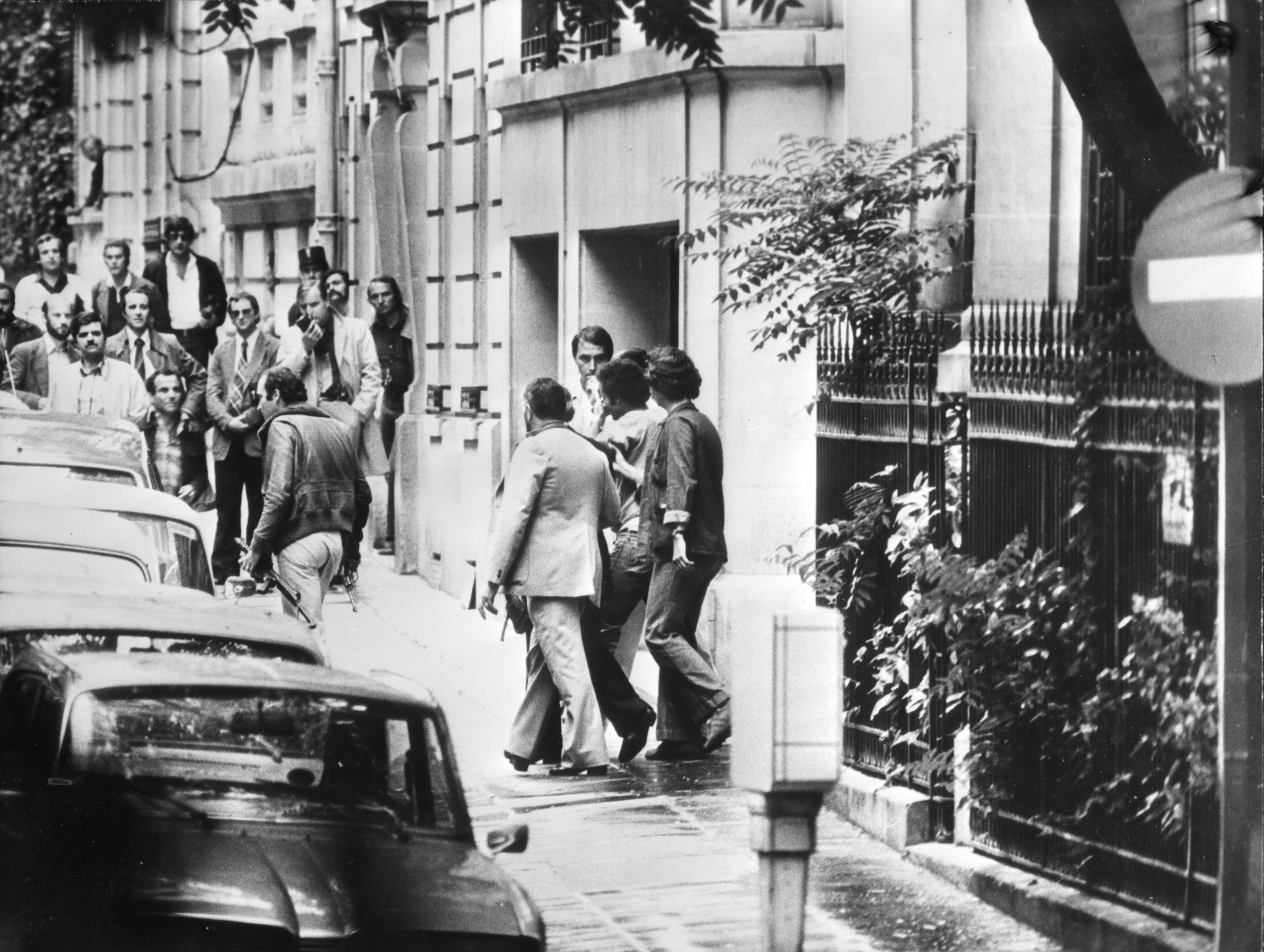 Collectie / Archief : Fotocollectie Anefo Reportage / Serie : [ onbekend ] Beschrijving : Aanslag Iraakse ambassade in Parijs Datum : 30 augustus 1978 Locatie : Frankrijk, Parijs Trefwoorden : aanslagen, ambassades Fotograaf : Fotograaf Onbekend / Anefo Auteursrechthebbende : Nationaal Archief Materiaalsoort : Negatief (zwart/wit) Nummer archiefinventaris : bekijk toegang 2.24.01.04 Bestanddeelnummer : 929-8768